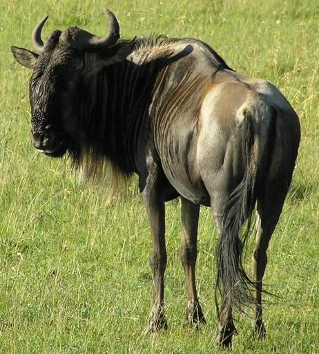 Gnu, fotografert i Masai Mara